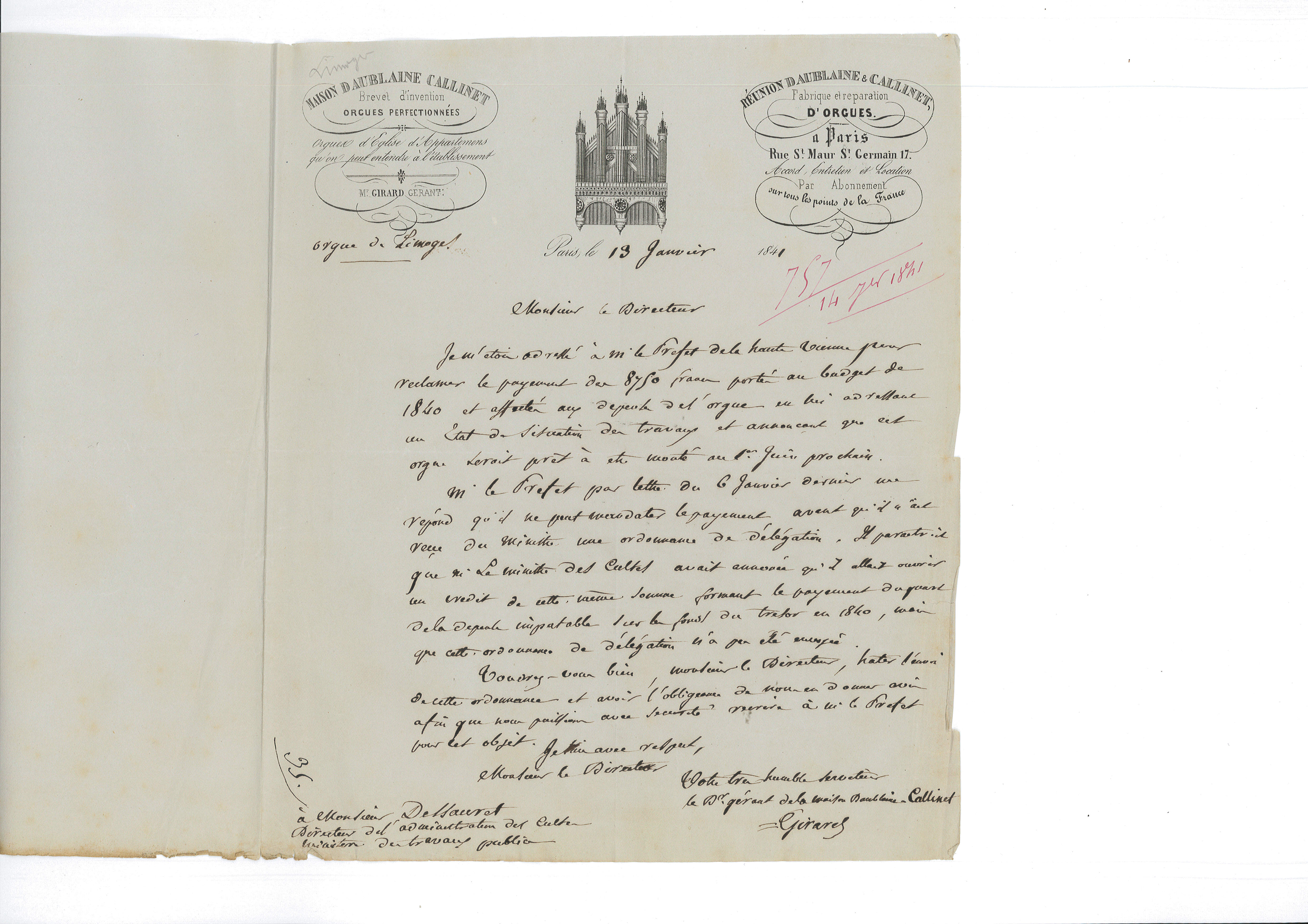 Lettre avec entête du facteur d'orgue Daublaine-Callinet (Paris) pour les travaux de restauration de l'orgue de la cathédrale de Limoges. Source : Archives nationales, cote F/19/7724